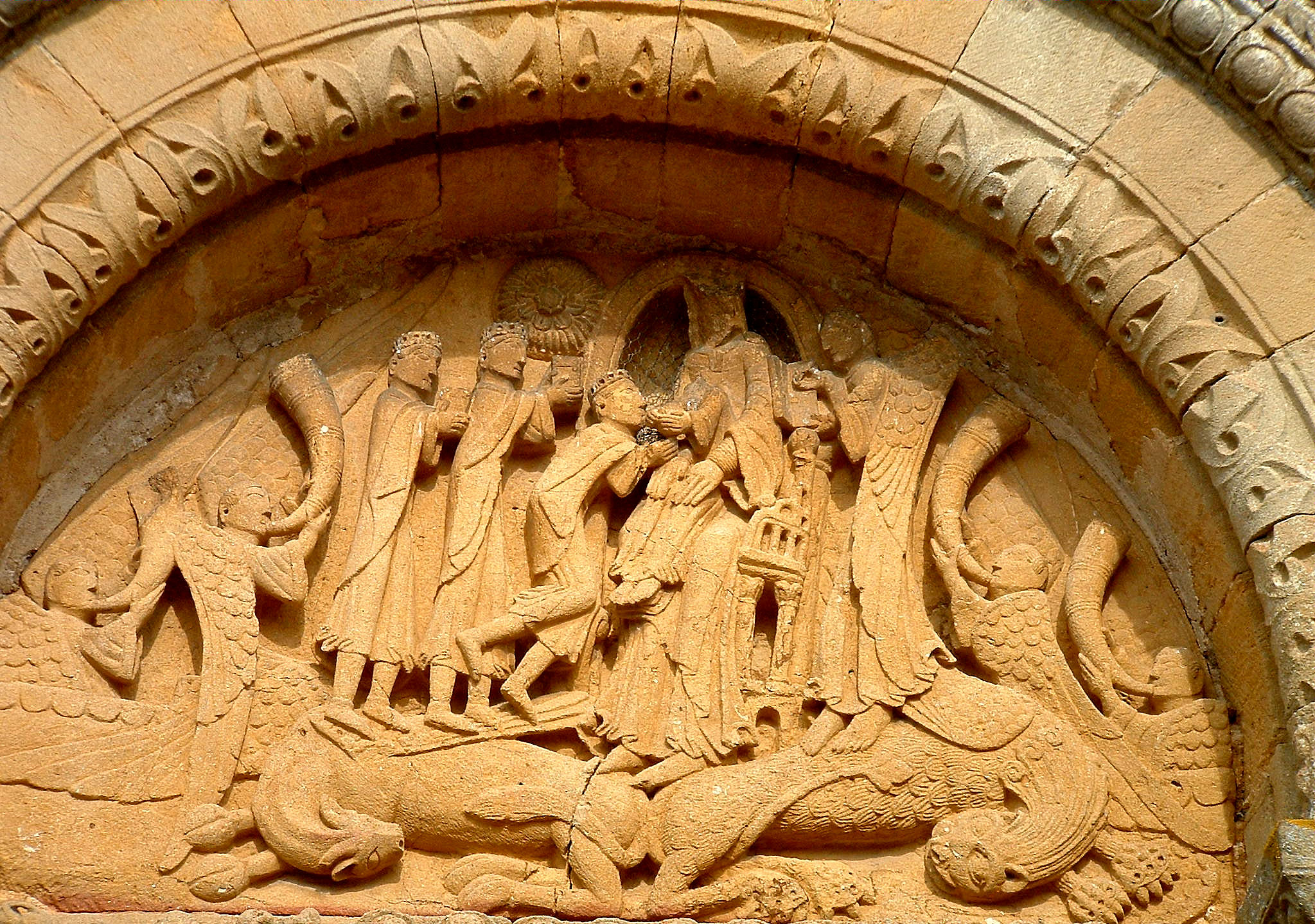 Neuilly-en-Donjon - Eglise Sainte-Madeleine - Ensemble de la partie supérieure du tympan - Adoration des Mages, l'Enfant Jésus est sur les genoux de la Vierge, des anges soufflent dans un olifant, un autre se tient derrière le siège de la Vierge